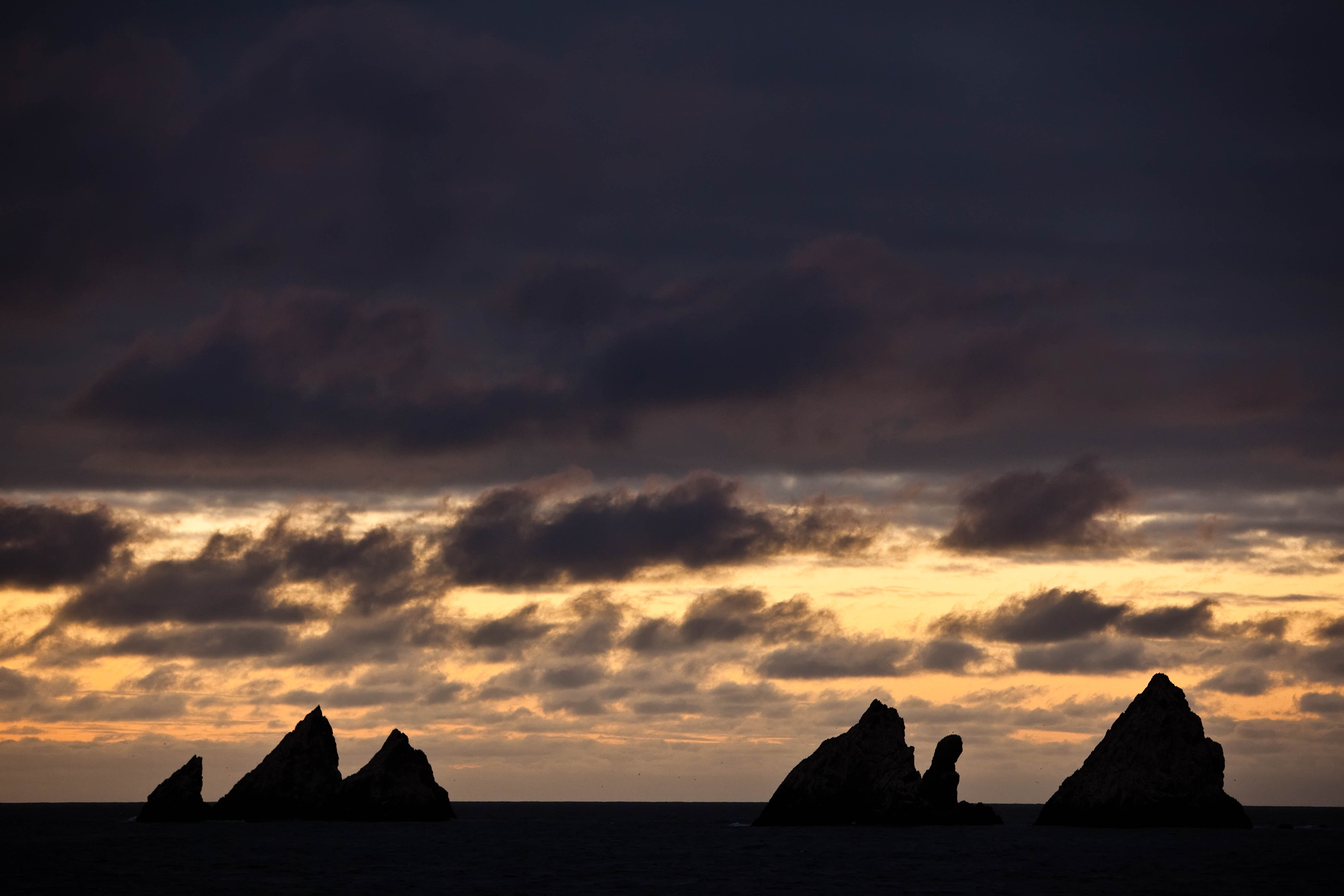 20090108-IMG_0387-Edit.jpg